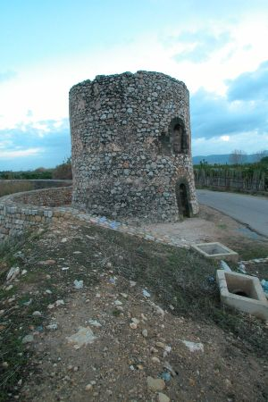 Torre de Guaita en Xeraco. La fotografía fue realizada por EntilZha